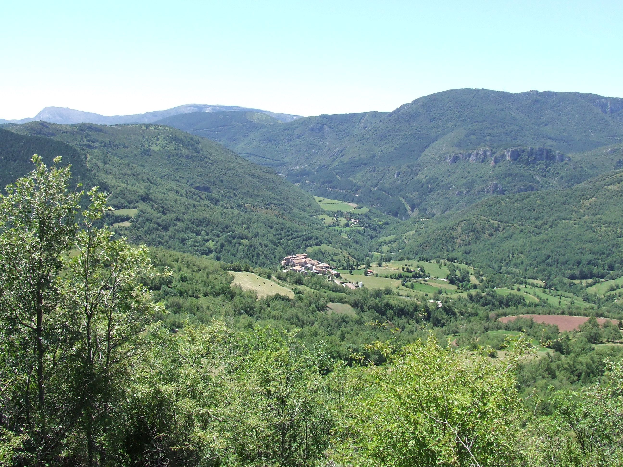 La vall del barranc de Malpàs (el Pont de Suert, Alta Ribagorça)